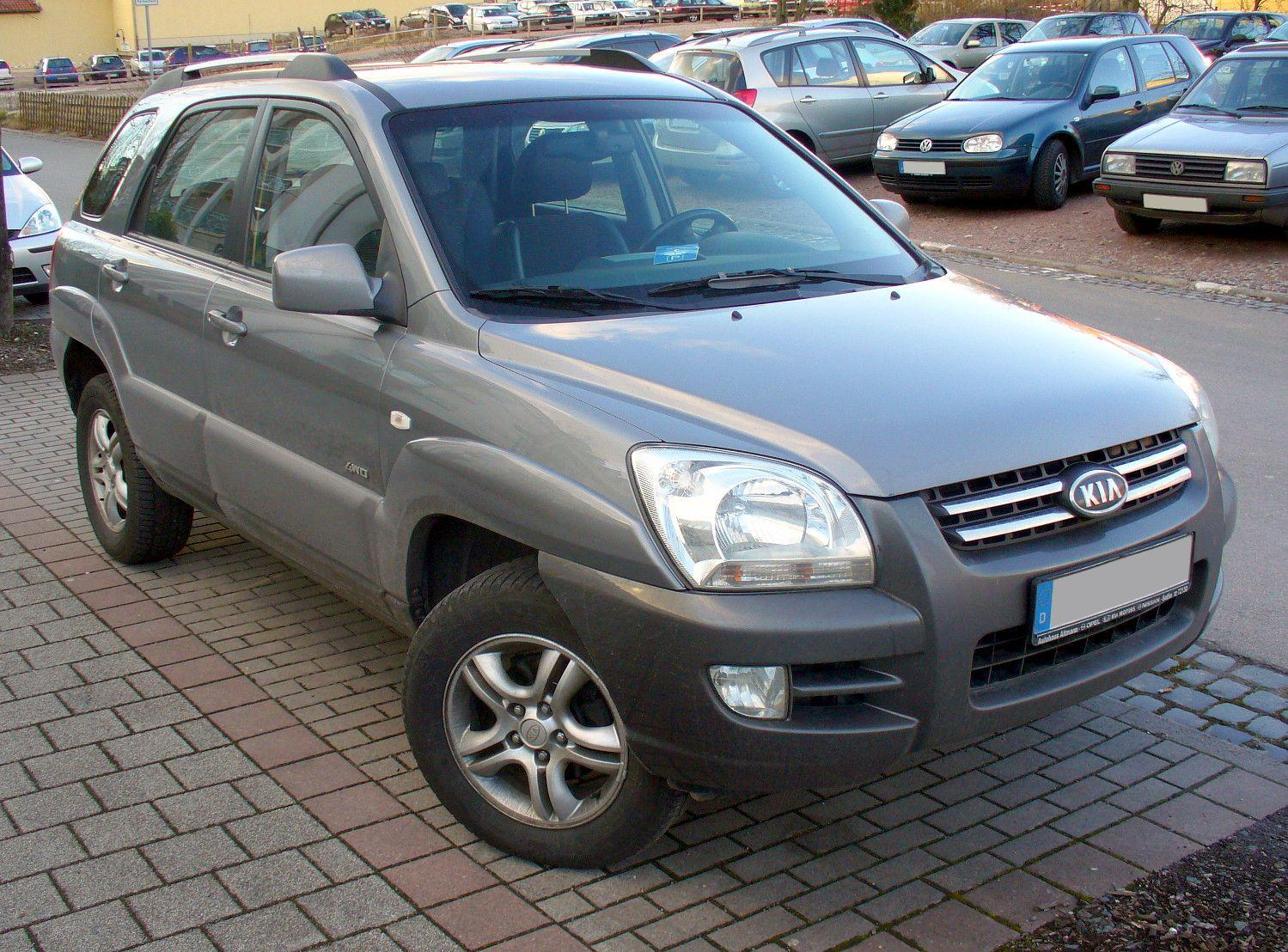 Kia Sportage